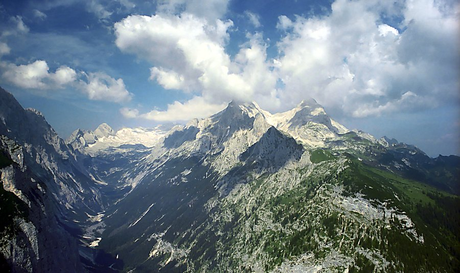 Aussicht vom Schachen aufs Zugspitzmassiv